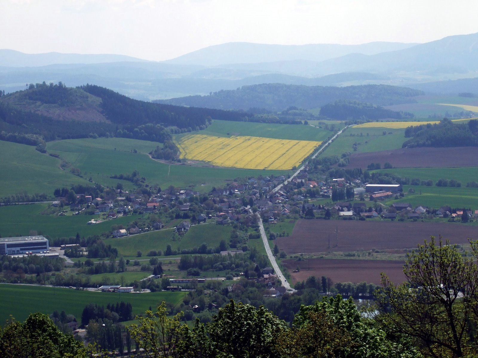 Pohled na Prapořiště z věže Rýzmberku.